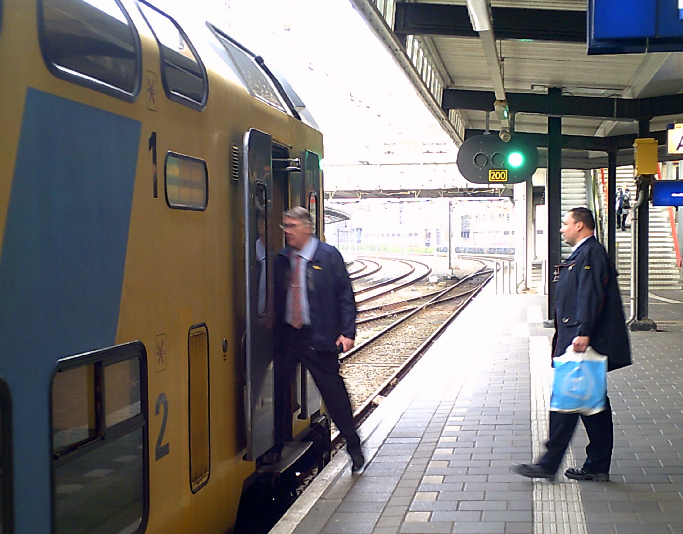 Omdat het groene sein vanaf het perron zichtbaar is, is er geen apart vertreklicht nodig.